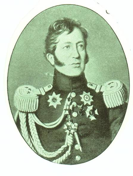 Ludwig Franz Xaver von Spitzemberg, 1812 - 1813 Kommandeur Kavallerie-Regiment Nr. 5 Dragoner Kronprinz (Ulanen-Regiment „König Wilhelm I.“ (2. Württembergisches) Nr. 20)